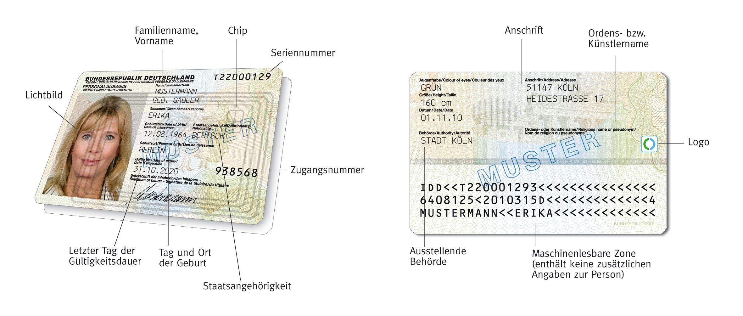 Muster mit Erklärungen vom neuen deutschen Personalausweis; Gültigkeit: ab 1. November 2010